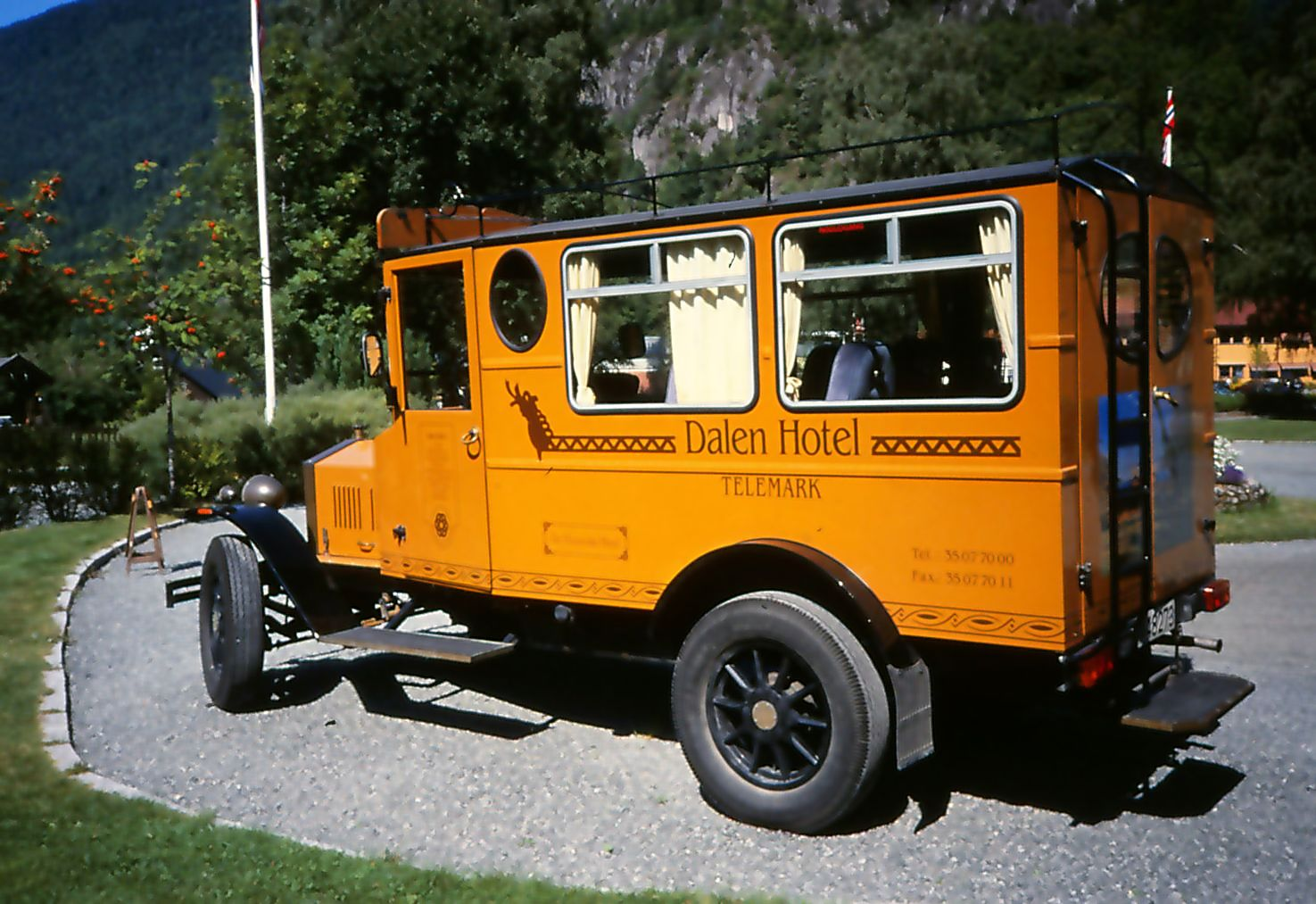 Dalen Hotels gamle bil til afhentning af gæster